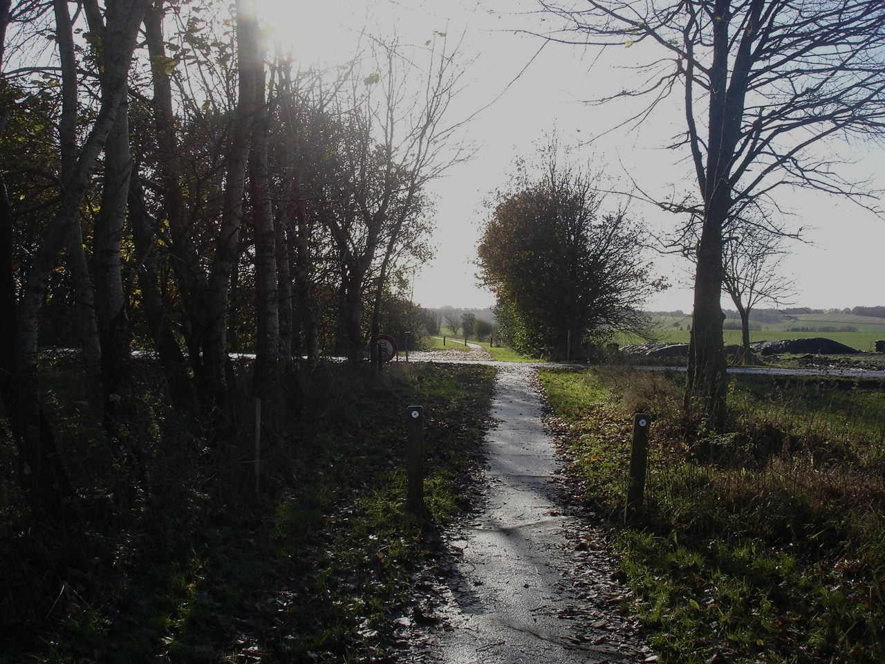 Natursti "Gjernbanen" krydser Trehøjevej - her lå Horn trinbræt